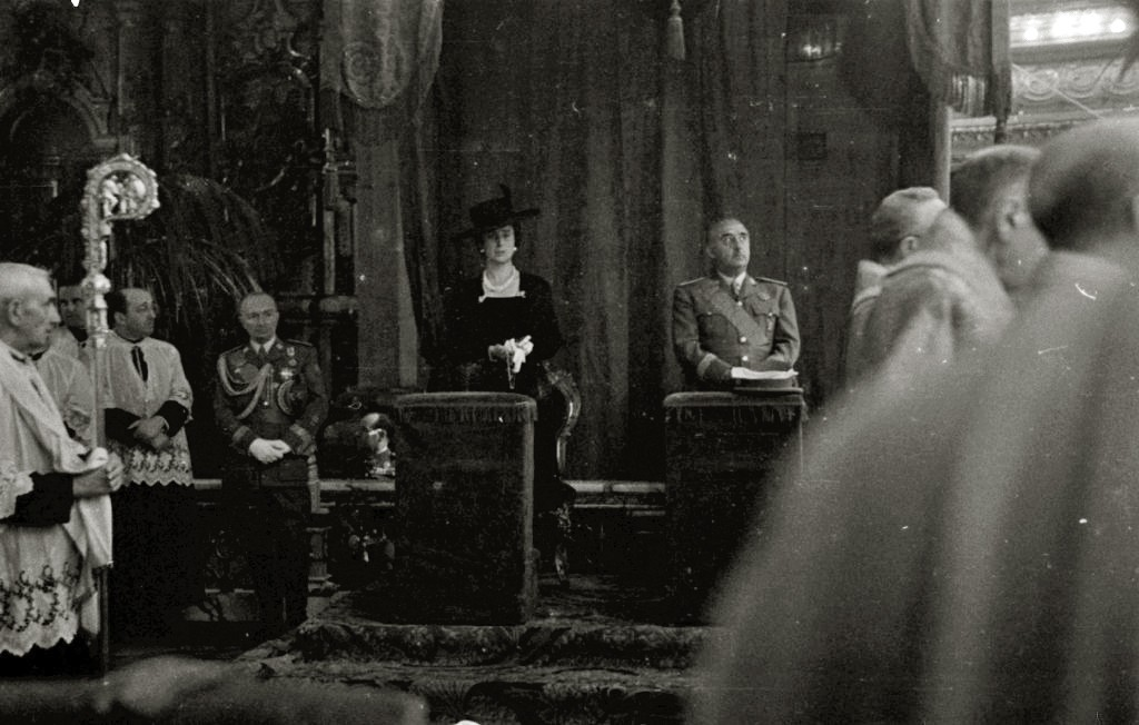 Título original: Francisco Franco en la iglesia de Santa María durante la celebración de la Salve (4/9) Localización: San Sebastián (Guipúzcoa)